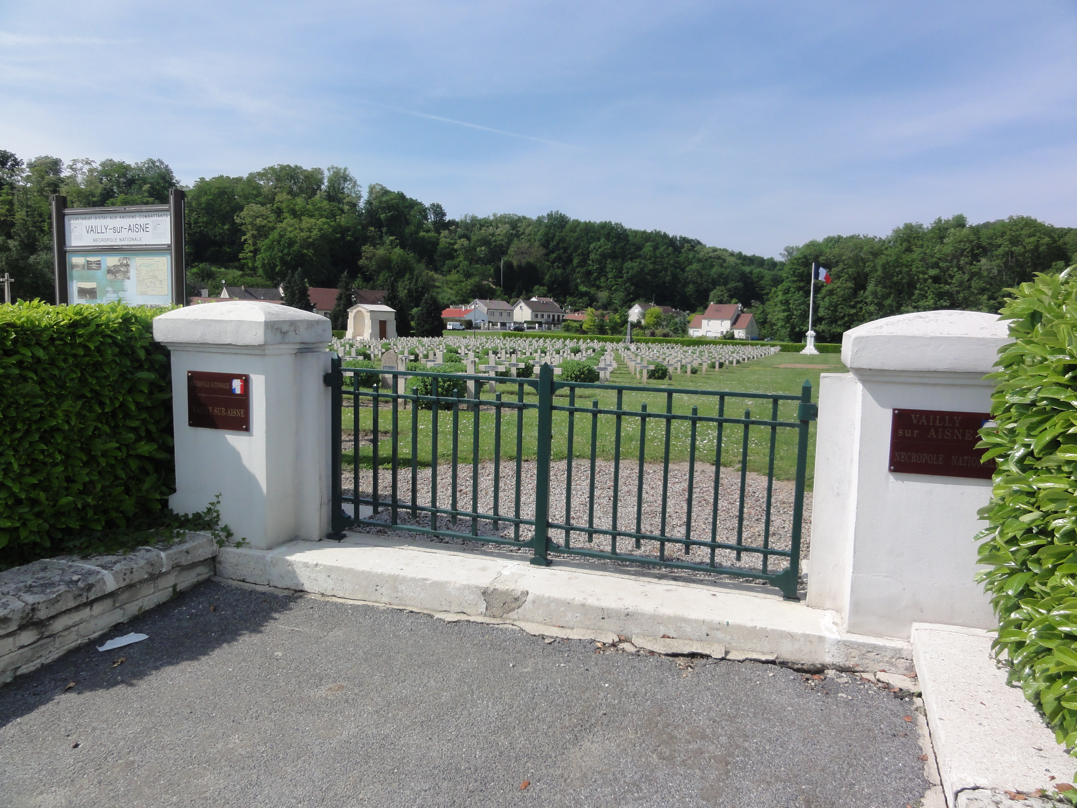 Vailly-sur-Aisne (Aisne) necropole nationale